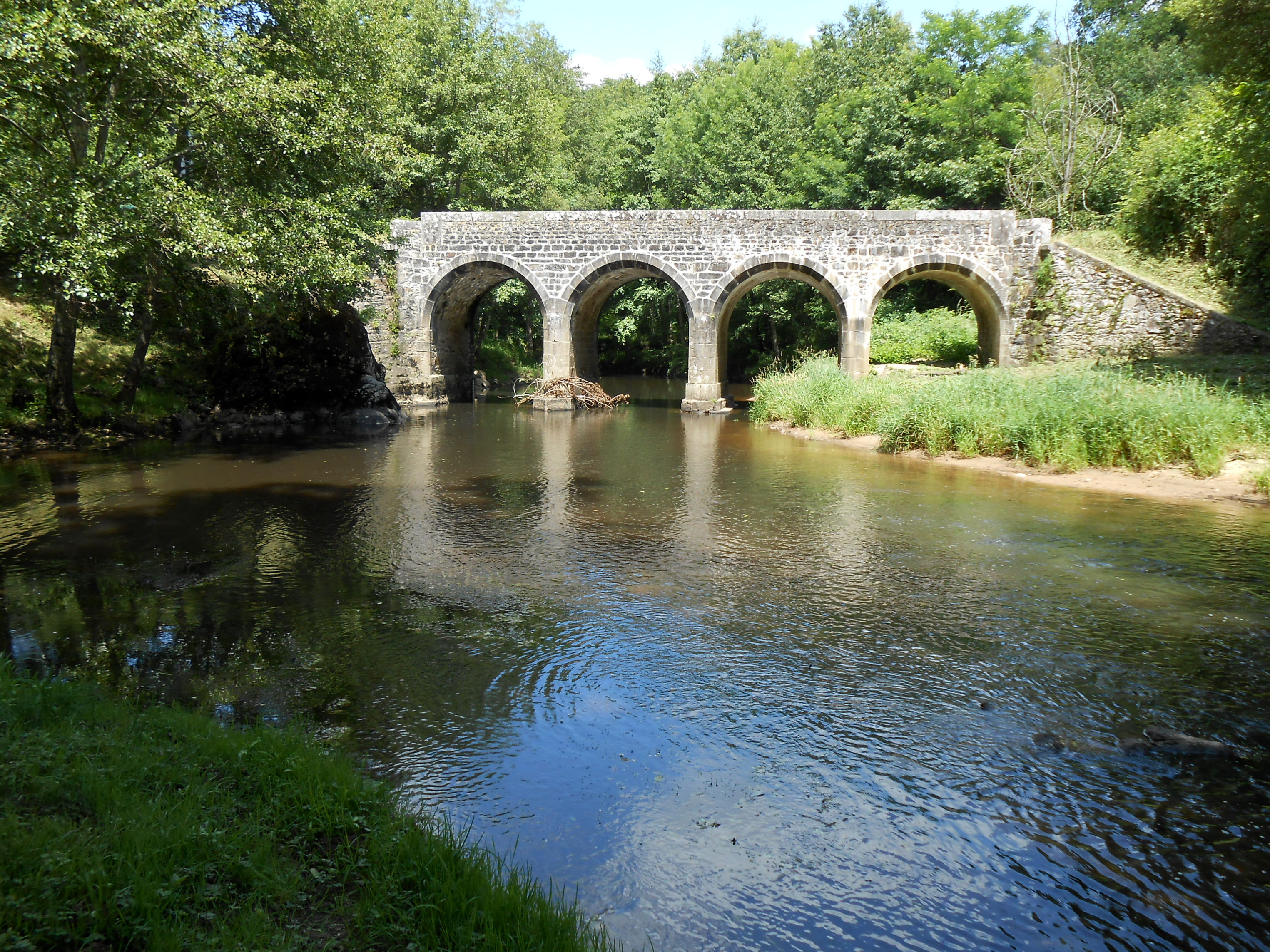 Pont Binot entre Esse et Brillac, Charente, France